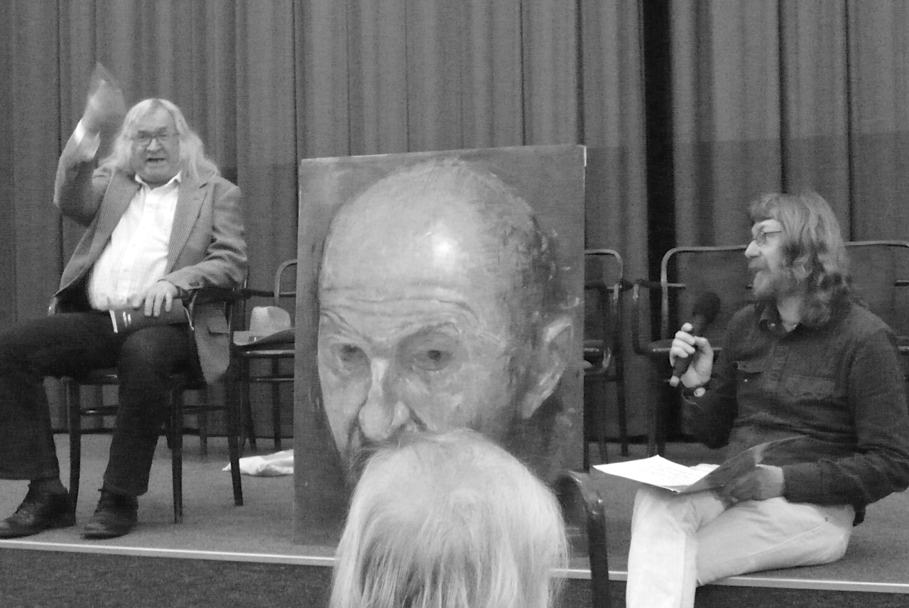 Zleva Magor (Martin Jirous), zprava Vladimír Hendrich v Ponrepu